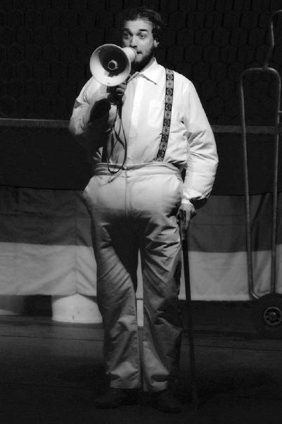 Sulla scena di Bundesliga' 44